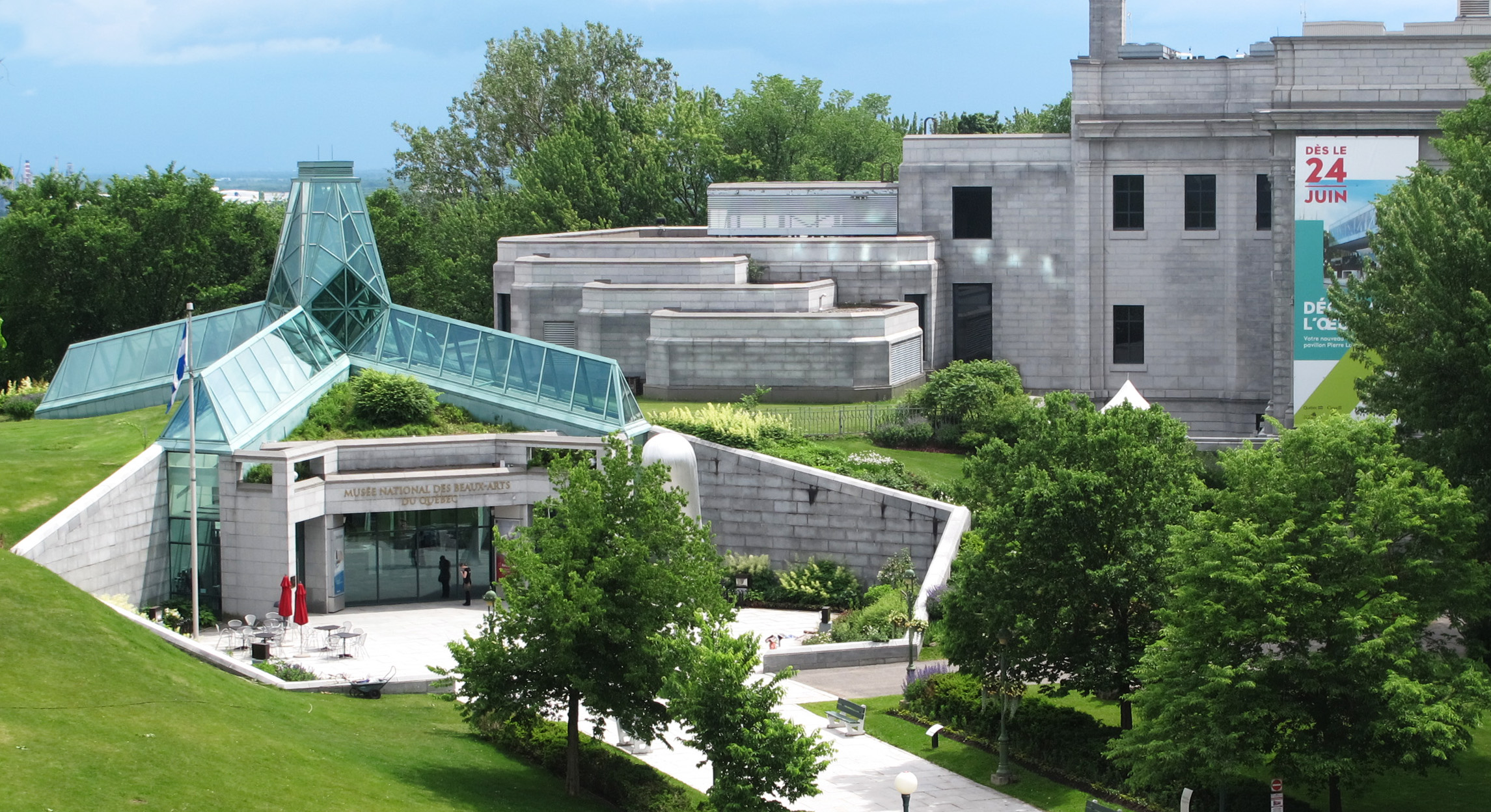 Musée national des beaux-arts du Québec (MNBAQ) Pavillon central et pavillon Gérard-Morisset Parc des Champs-de-Bataille Québec (Québec) Canada